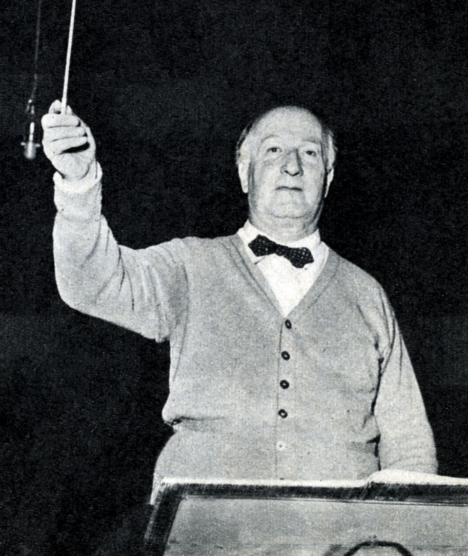 photo from magazine Radiocorriere (1954)